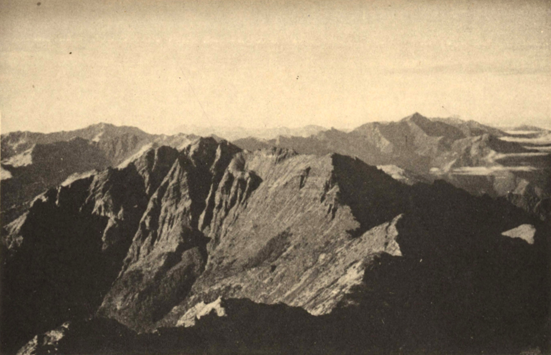 中文（台灣）: 新高山頂，為今日玉山山頂